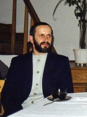 Zdjęcie ze zbiorów Jana Henryka Cichosza